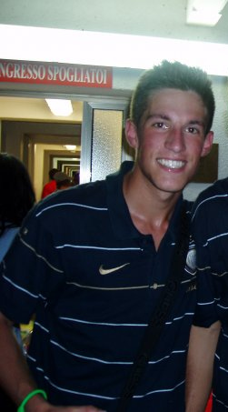 Cristiano Biraghi ai tempi dell'Inter